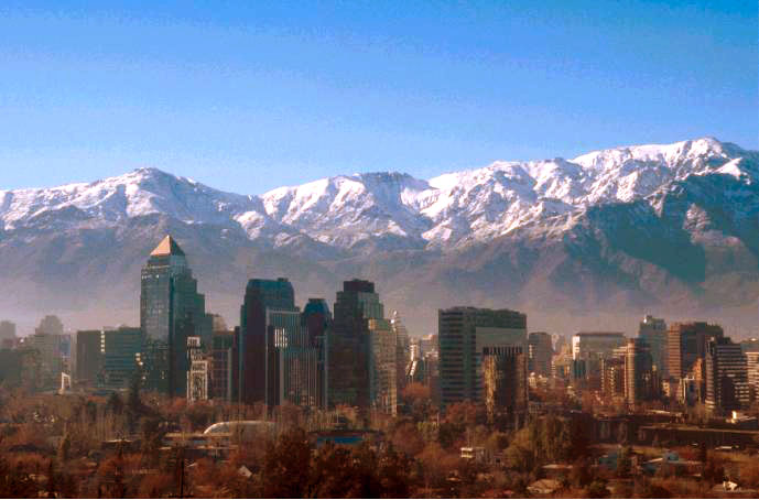 Santiago Oriente, vista desde el Cerro San Cristóbal. Abril de 2005. Fotografía por Der schöne Tod.